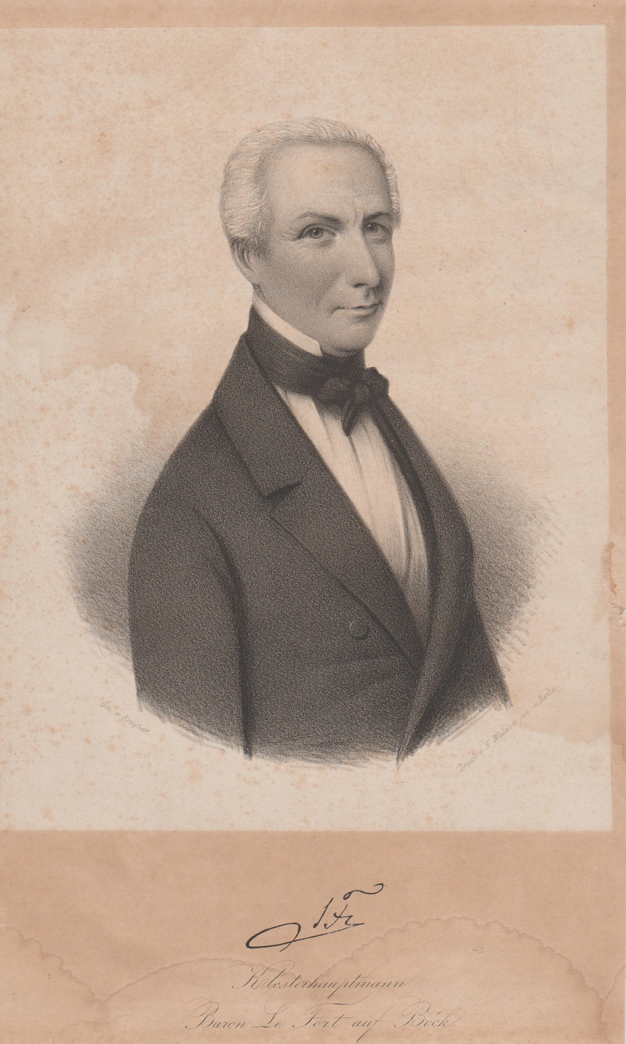 Lithografie von Carl Peter Johann von Le Fort, Klosterhauptmann des Klosters Dobbertin